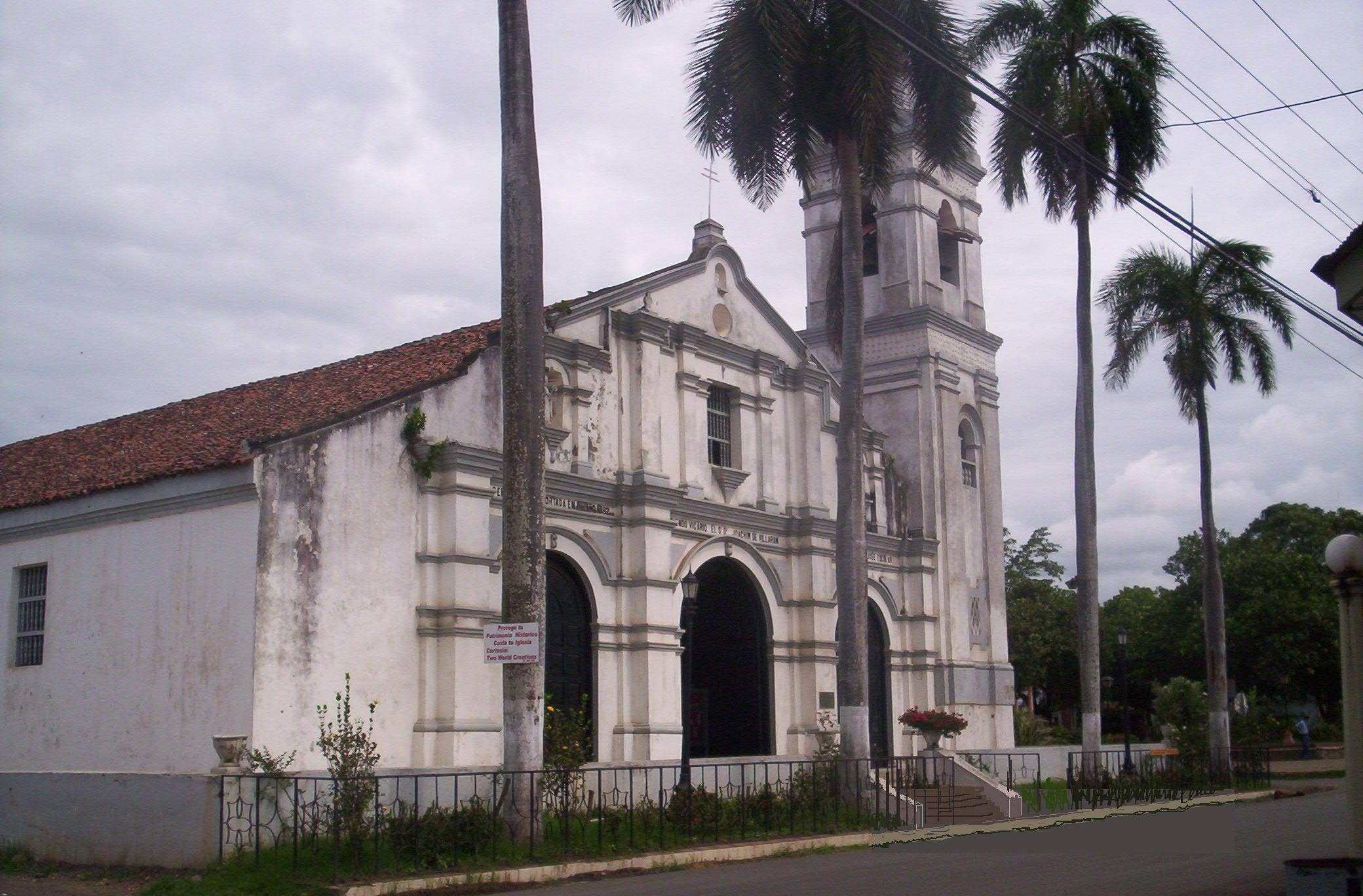 ilgesia de san atanasio de la villa de los santos